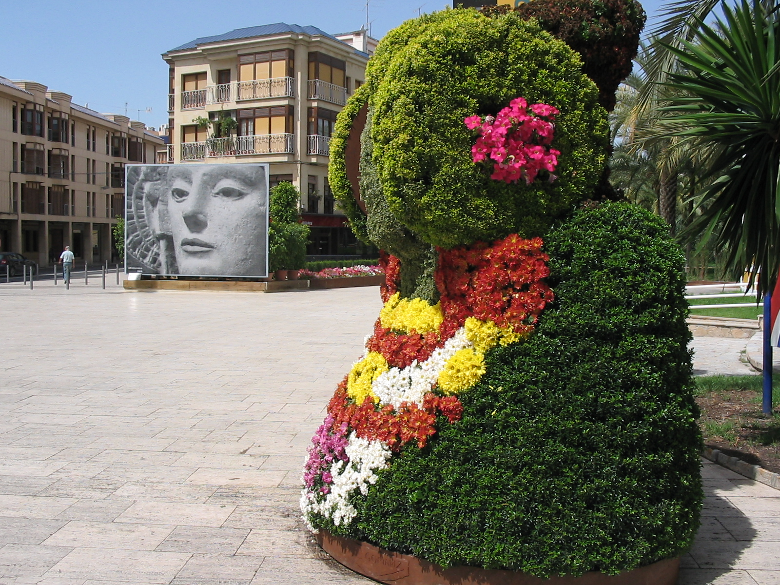 Una de las múltiples réplicas de la Dama de Elche repartida por la ciudad, ésta compuesta por flores. Al fondo, un vitromosaico del rostro de la Dama.